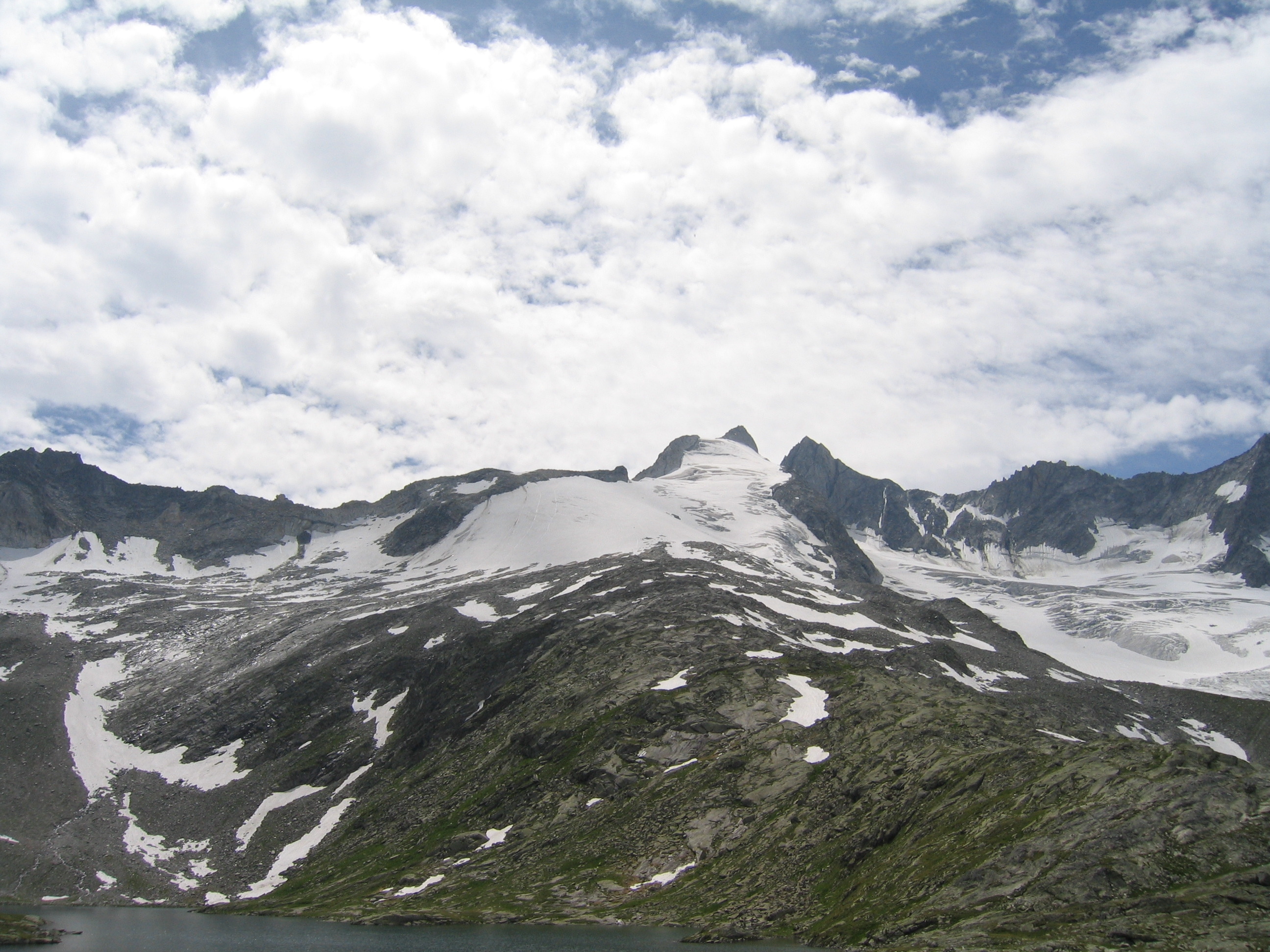 Die Reichenspitzgruppe vom Unteren Gerlossee an der Zittauer Hütte aus betrachtet; mittig der Gabler (links) und die Reichenspitze (rechts), am rechten Bildrand der Hahnenkamm